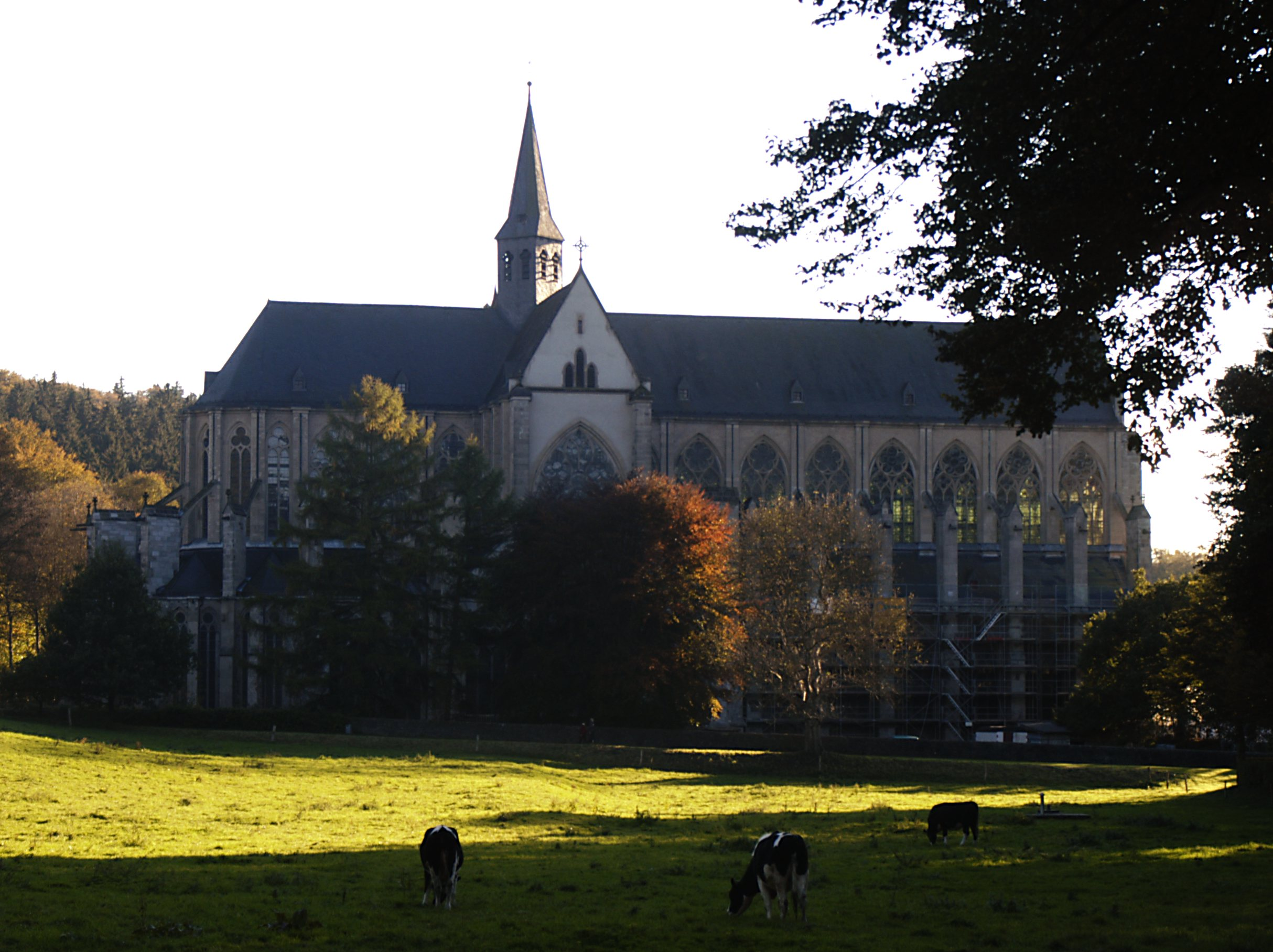 Altenberger Dom